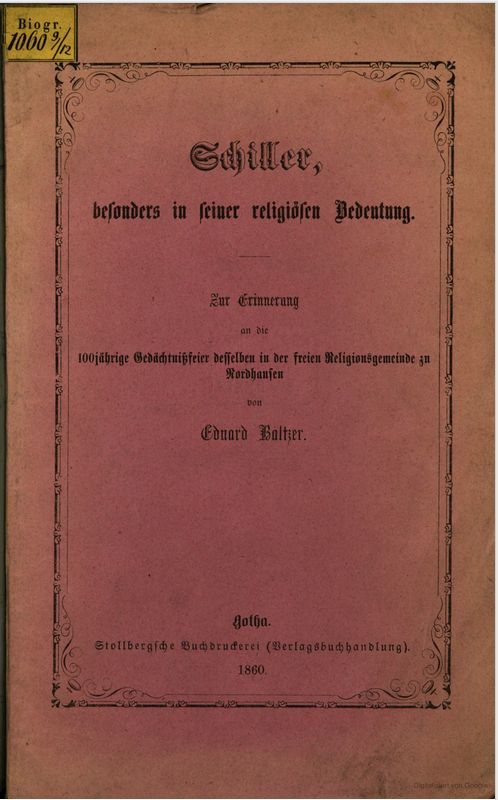 Titelblatt Schiller, besonders in seiner religiösen Bedeutung, 1860 erschienen in der Stollbergschen Buchdruckerei und Verlagsbuchhandlung, Gotha (Link zum Digitalisat)